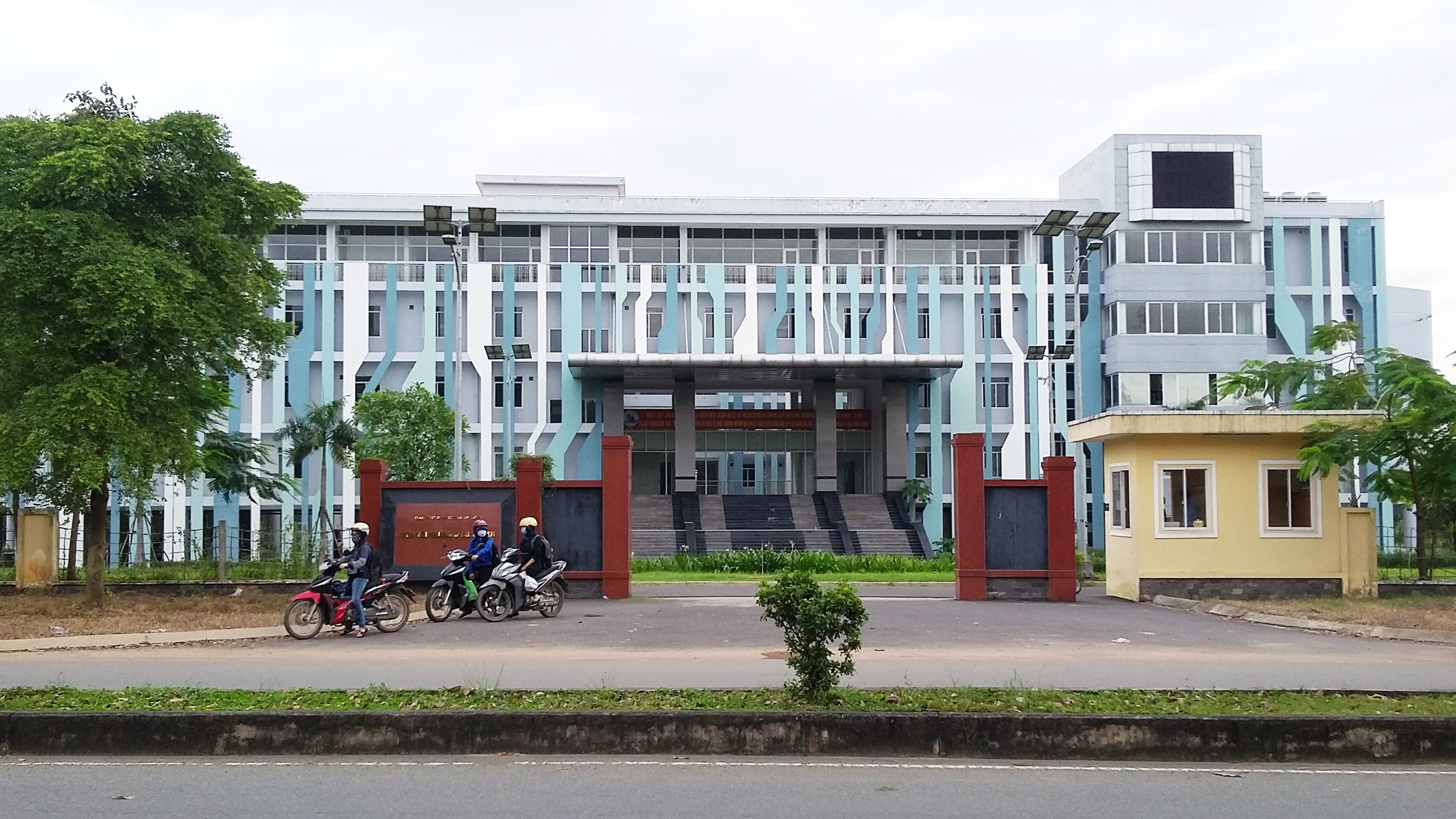 Viện Môi trường – Tài nguyên, ĐHQG TP.HCM